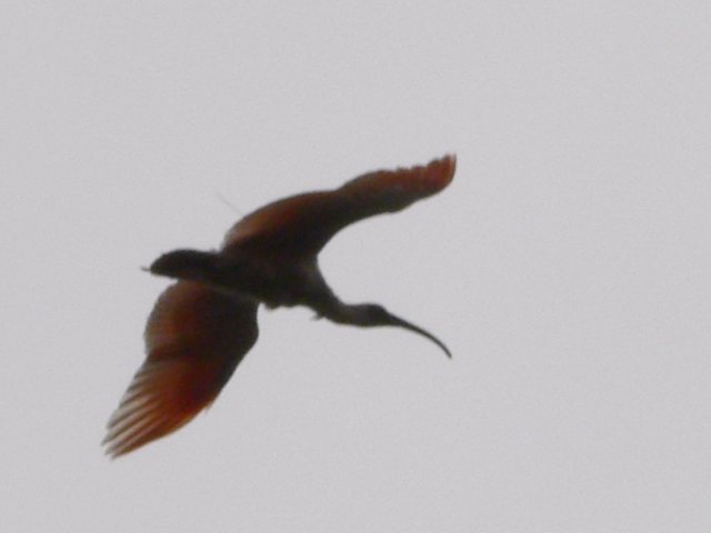 トキの写真。2009年12月30日 13:10:54、新潟県佐渡市新穂長畝内巻にて投稿者が撮影。湾曲した嘴、伸ばしたままの首、「とき色」と呼ばれる翼、尾羽から出ない脚が特徴的。GPS発信機が付けられているのが微かに見える。